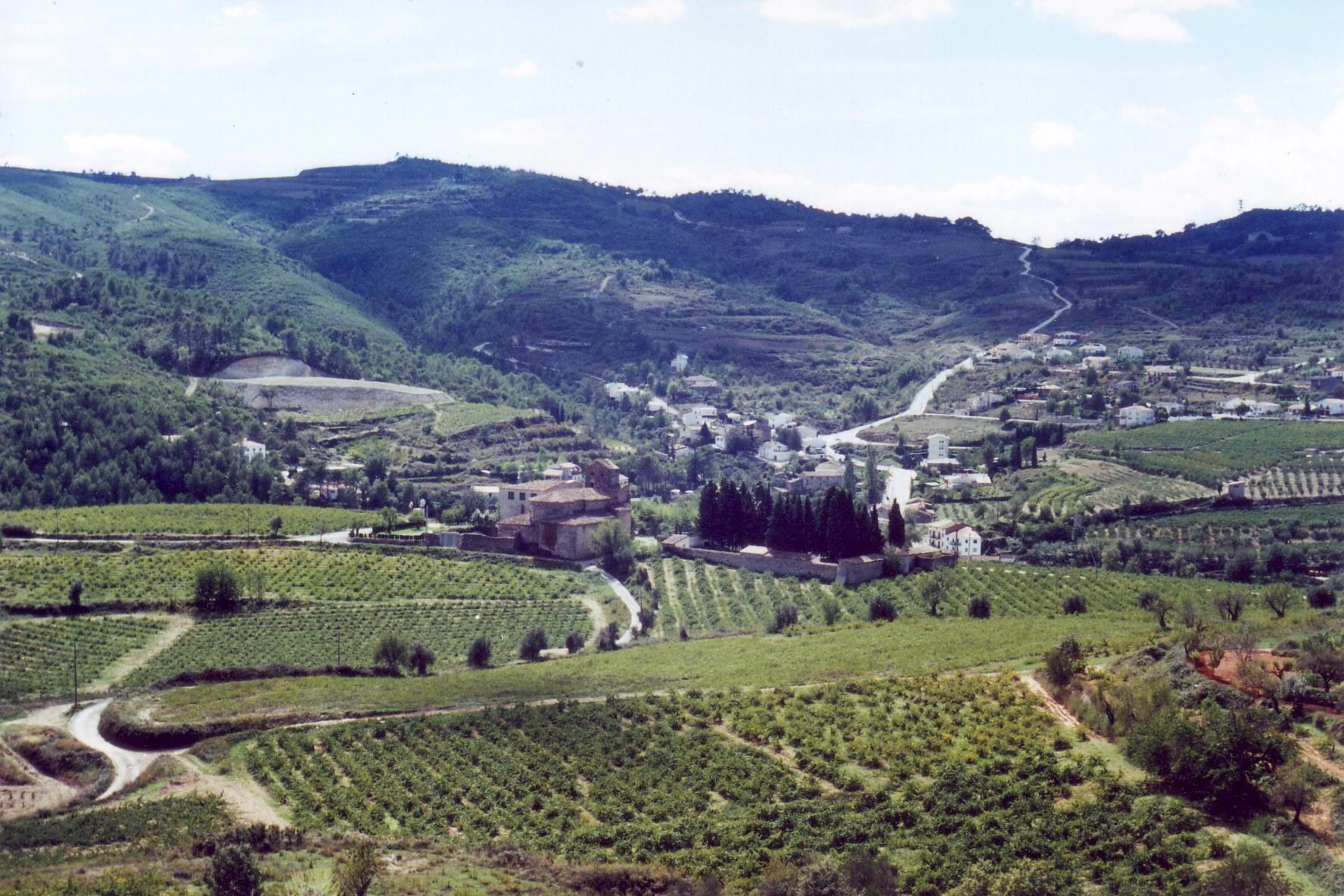 Vista del poble des de el barri de La Rectoria.